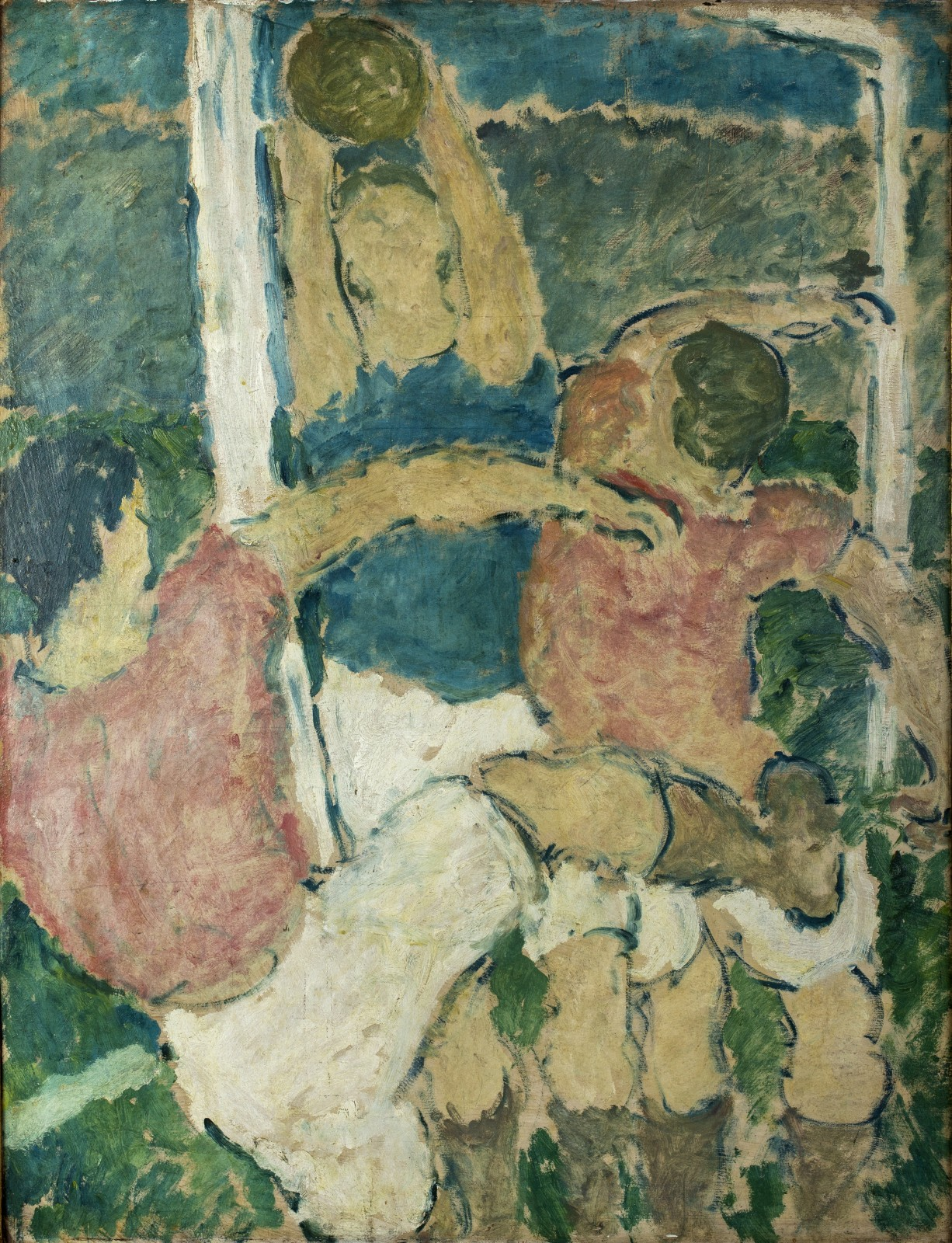 Fodboldspillere foran mål, (1911), Olie på træfiberplade compoboard), Nettomål: 122,0 x 93,8 cm